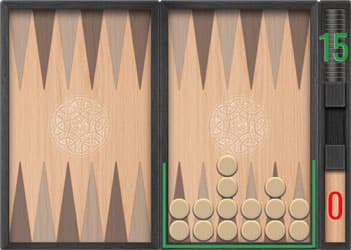 Домашний марс